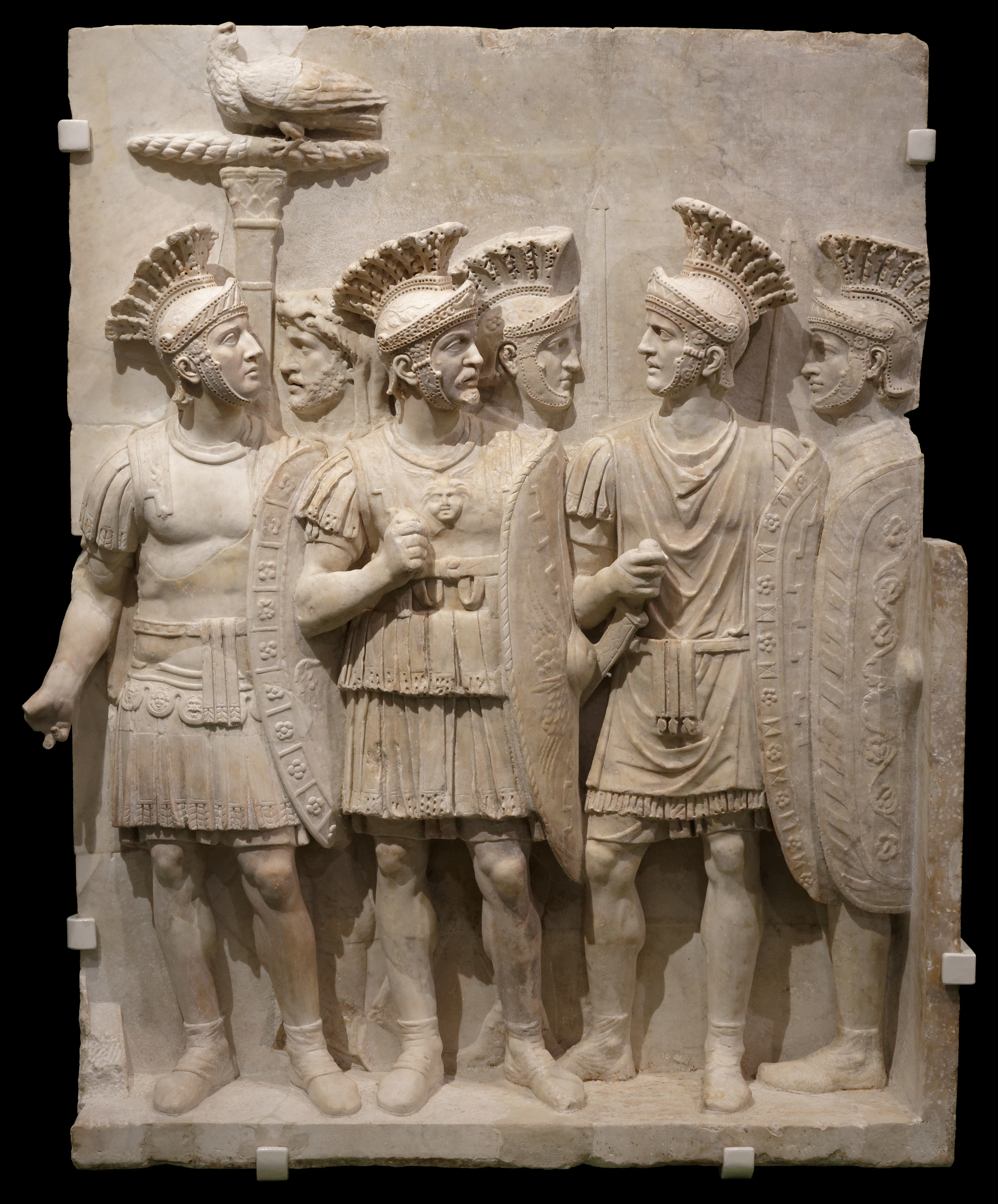 Relief des prétoriens Marbre veiné de gris Paris, Musée du Louvre, Département des Antiquités grecques, étrusques et romaines, Ma 1079 - LL 398